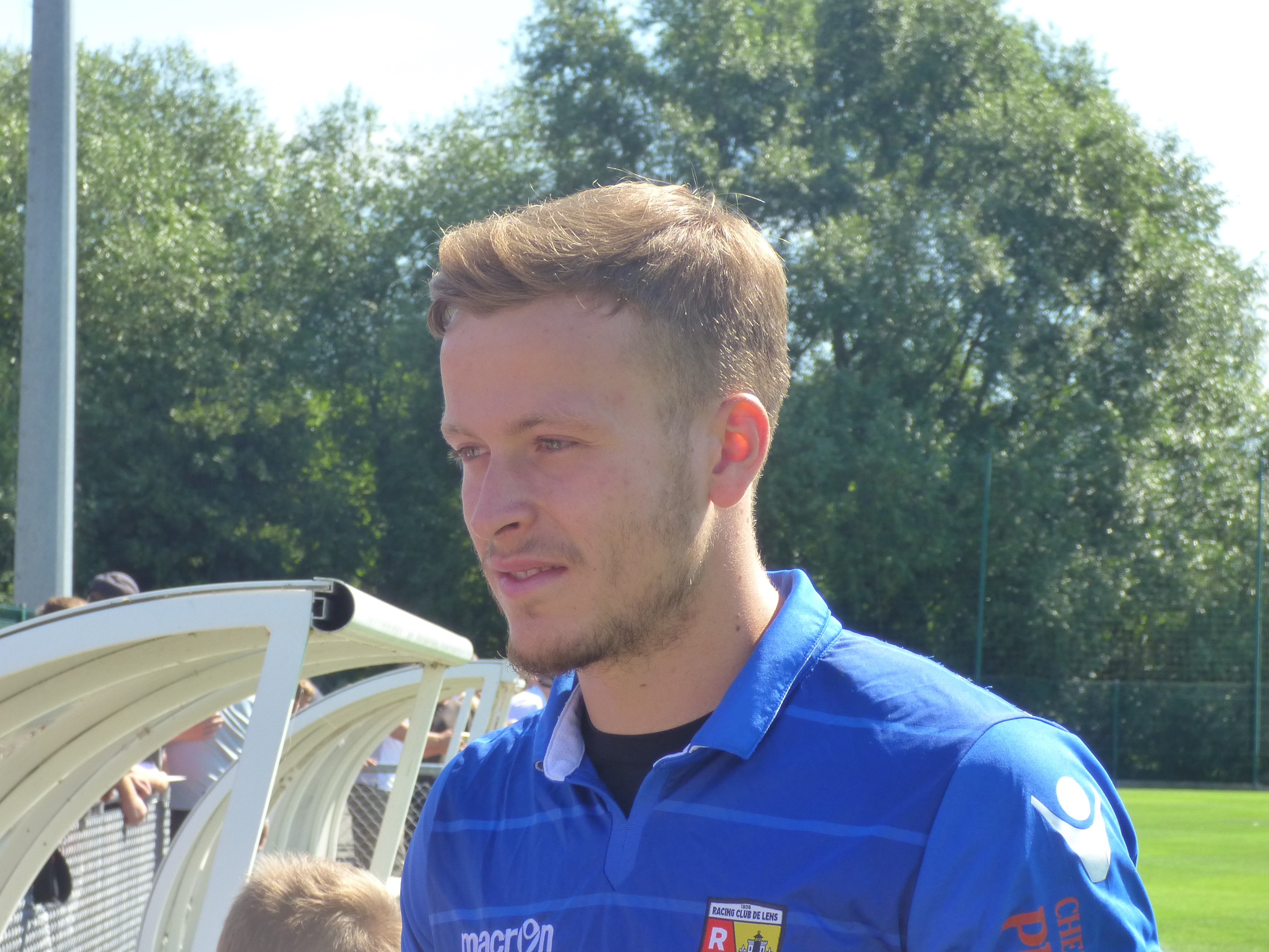 Valentin Belon lors d'un entraînement public du Racing Club de Lens, le 2 août 2018, au Centre technique et sportif de La Gaillette à Avion.